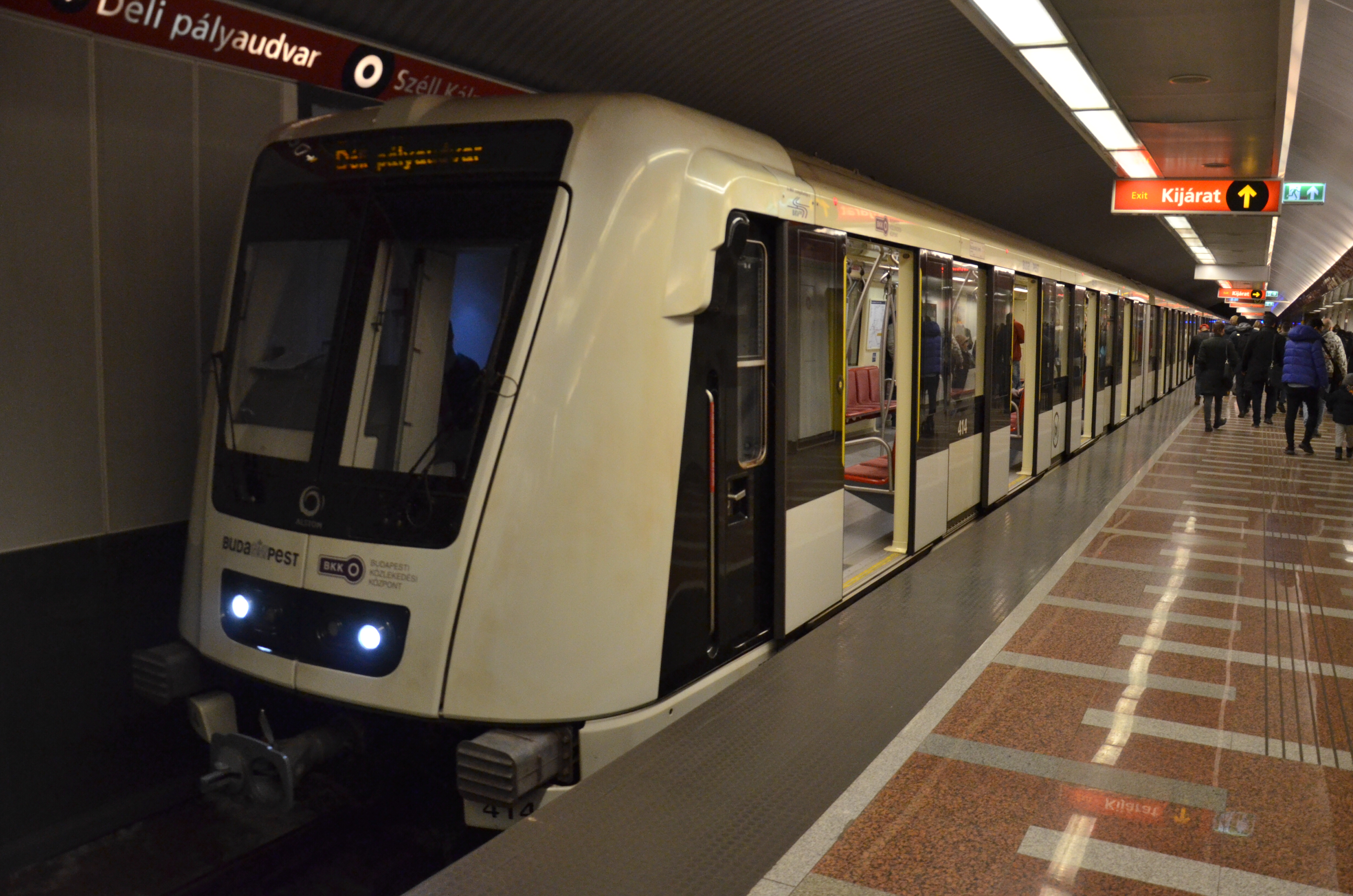 Rame Alstom Metropolis à la station Széll Kálmán tér de la ligne 2 du métro de Budapest.